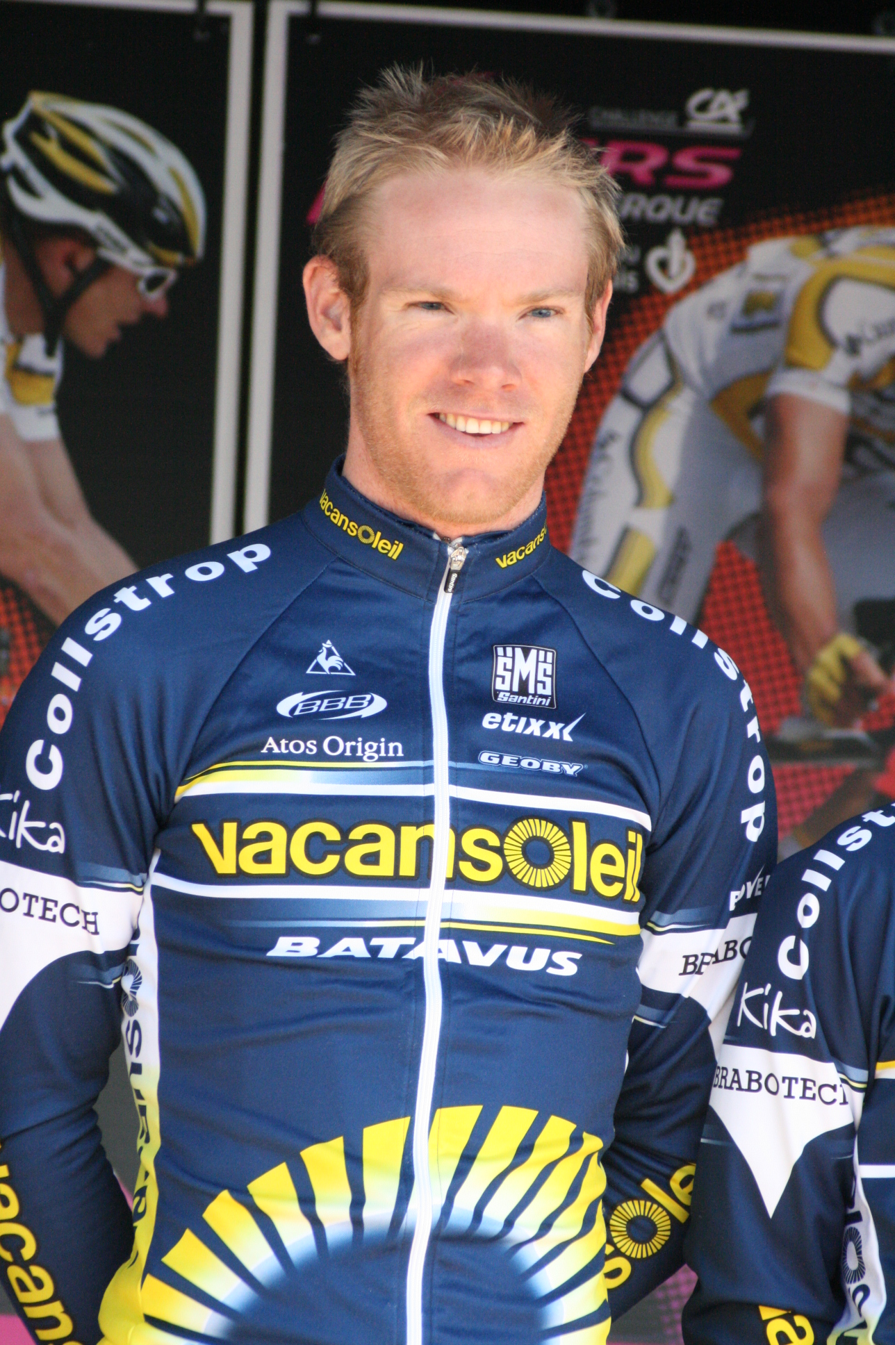 Jens Mouris lors de la présentation des équipes des 4 jours de Dunkerque